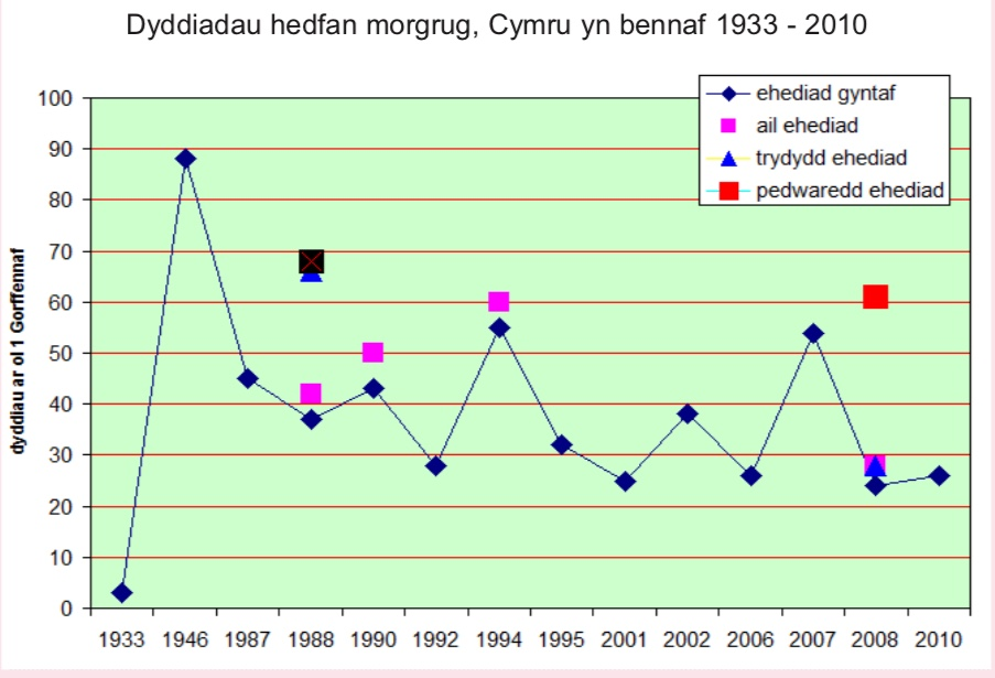 Dyddiadau hedfan morgrug, Cymru yn bennaf 1933-2010